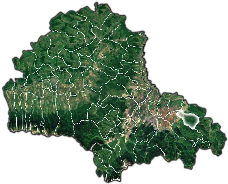 Budila jud Brasov